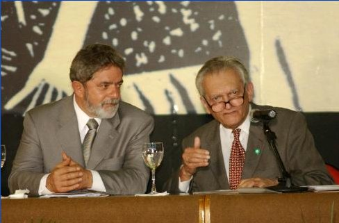 Fortaleza - Ao lado do presidente Lula, o economista Celso Furtado, durante a solenidade de recriação da Superintendência do Desenvolvimento do Nordeste, a Sudene, em Julho de 2003.Foto: Marcello Casal Jr / ABr